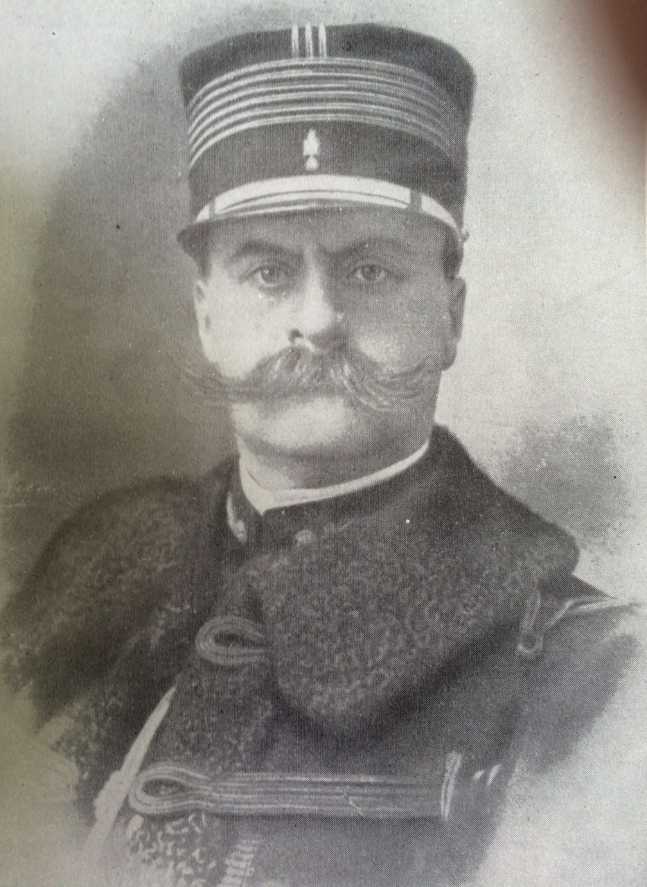 Crl Felix D´André Director de la EMCH 1906 - 1907